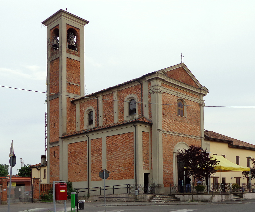 La chiesa parrocchiale dei Santi Pietro e Paolo a Mezzate, frazione di Peschiera Borromeo.